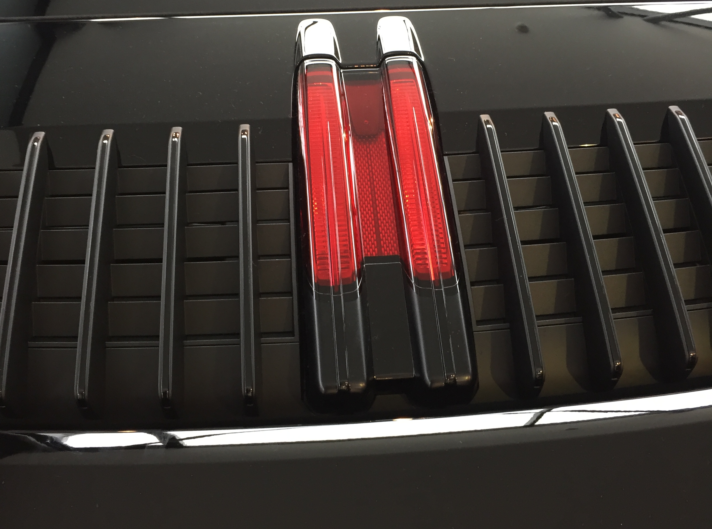 Porsche 911 (992) Detailansicht 3. Bremsleuchte